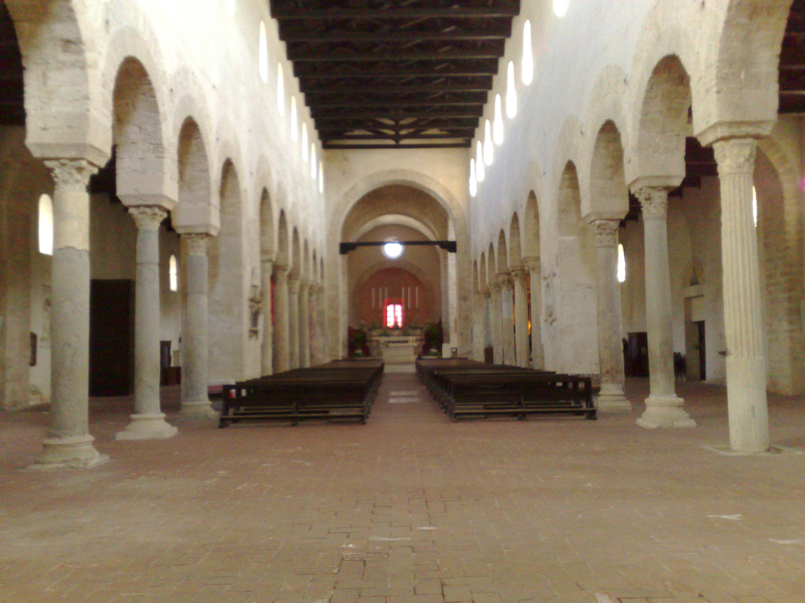 Cattedrale di Gerace. Interno